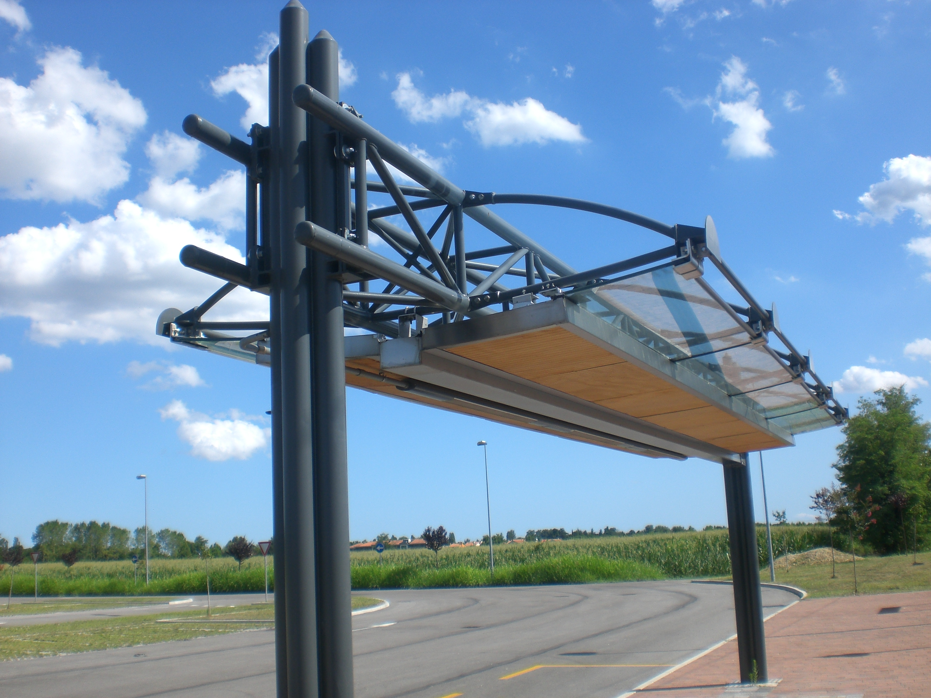 San Trovaso pensilina bus nella stazione